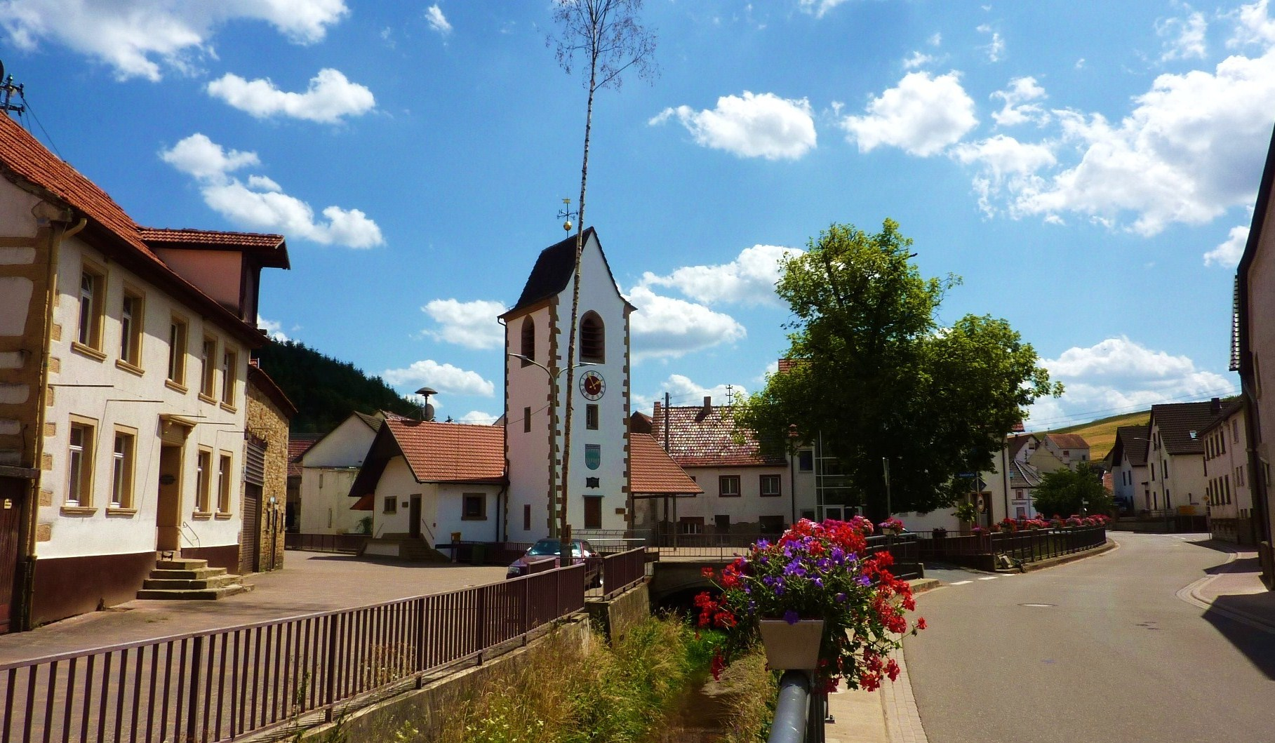 Ortsmittelpunkt Waldgrehweiler mit Bürgerhaus, Jugendraum, ehem. Milchsammelstelle und Glockenturm